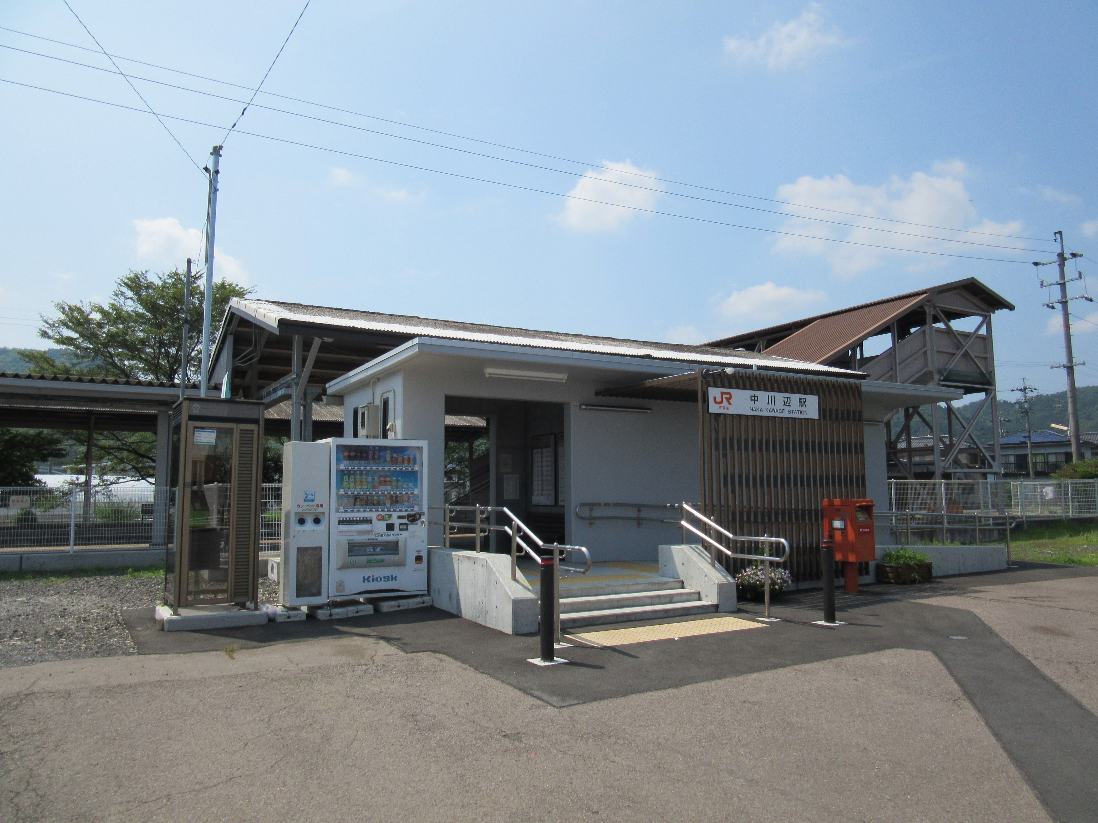 中川辺新駅舎